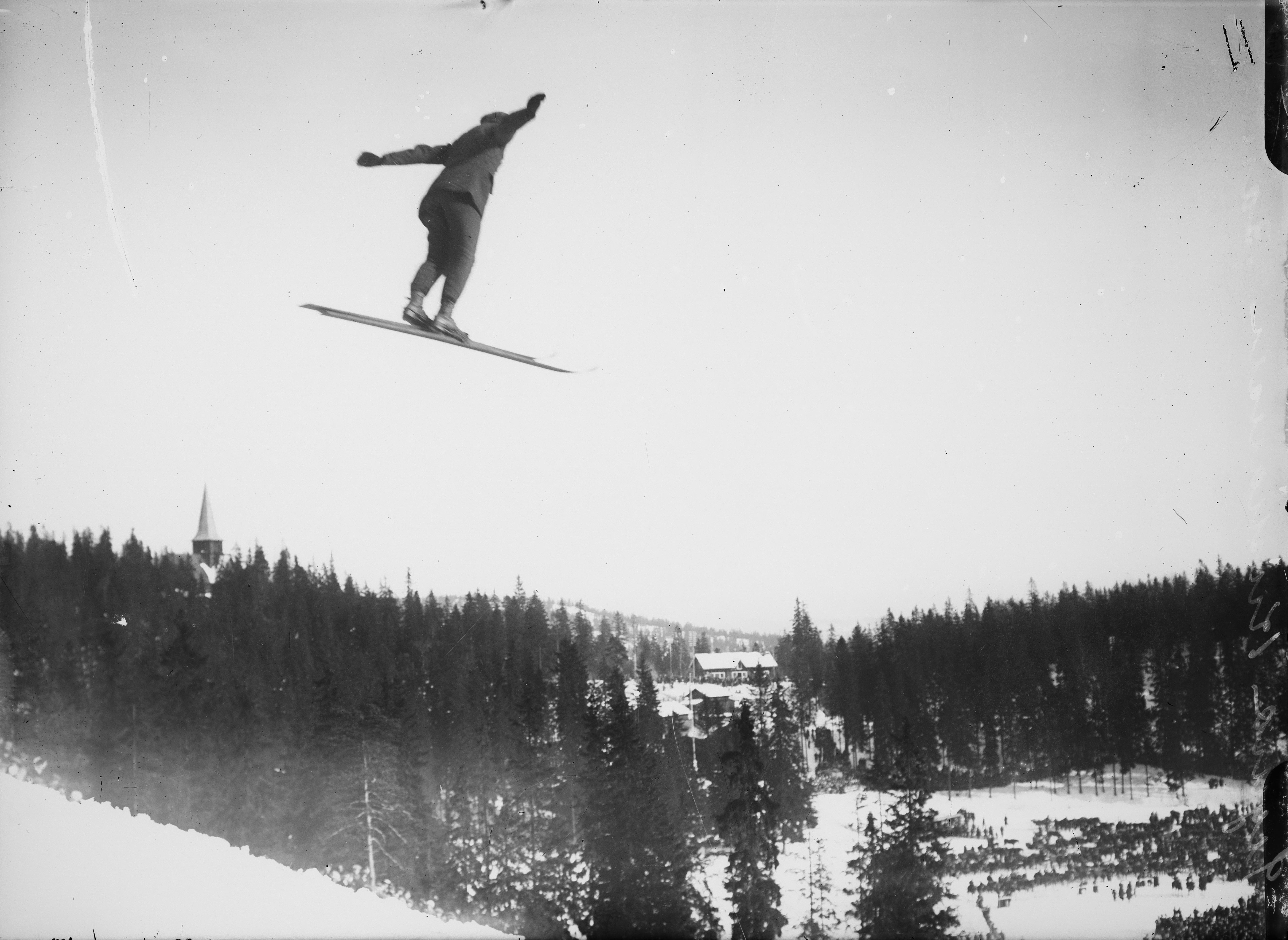 Bildet er hentet fra Nasjonalbibliotekets bildesamling. Anmerkninger til bildet var: Påskrift eske: Nydalsrendet 1917 Påskrift negativ: Sigurd Kristiansen Nydalen, Oslo, Oslo